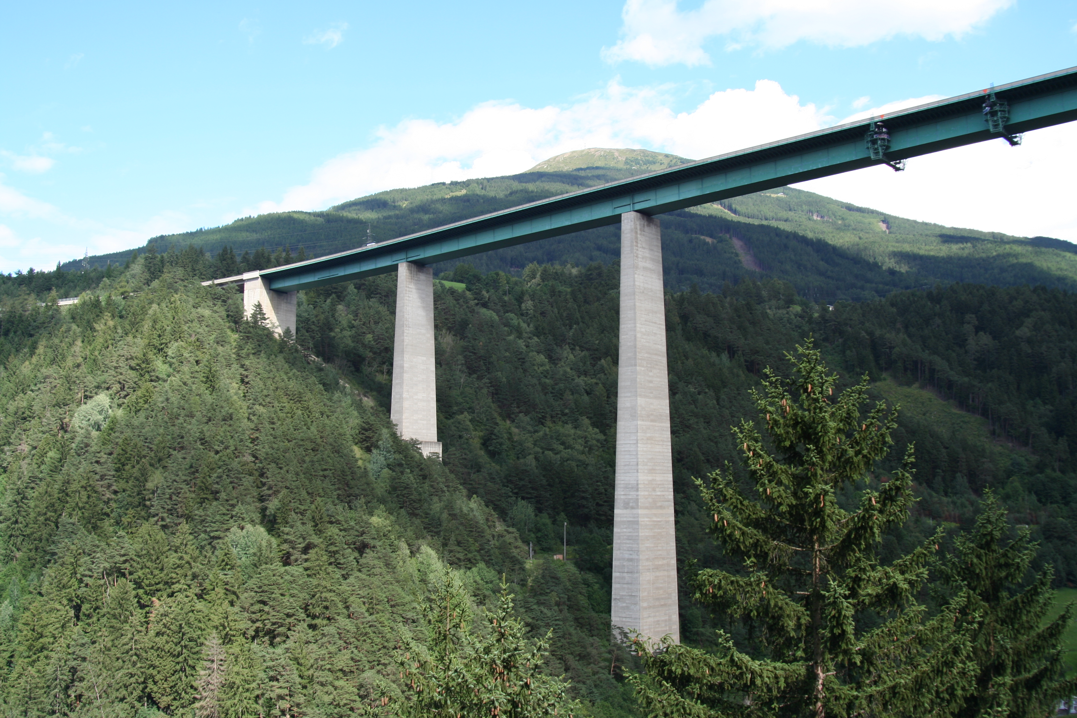 Europabrücke, Austria